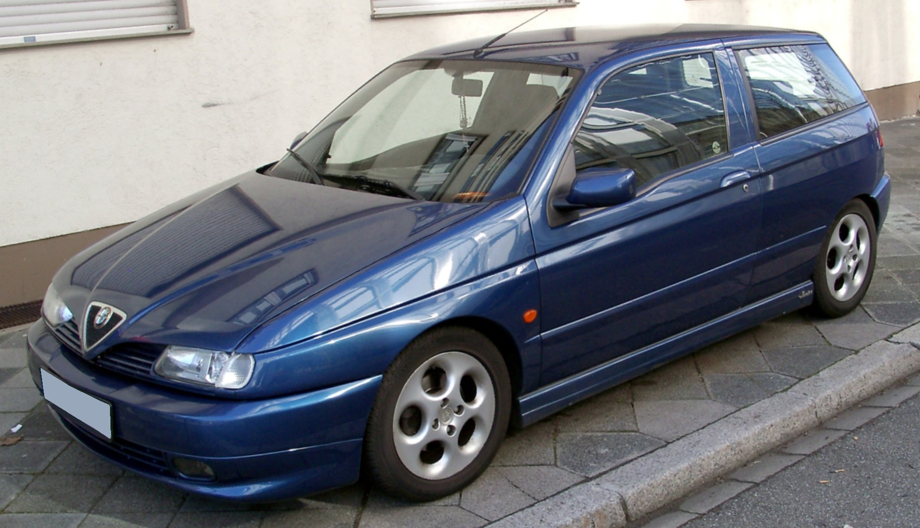 Alfa Romeo 145